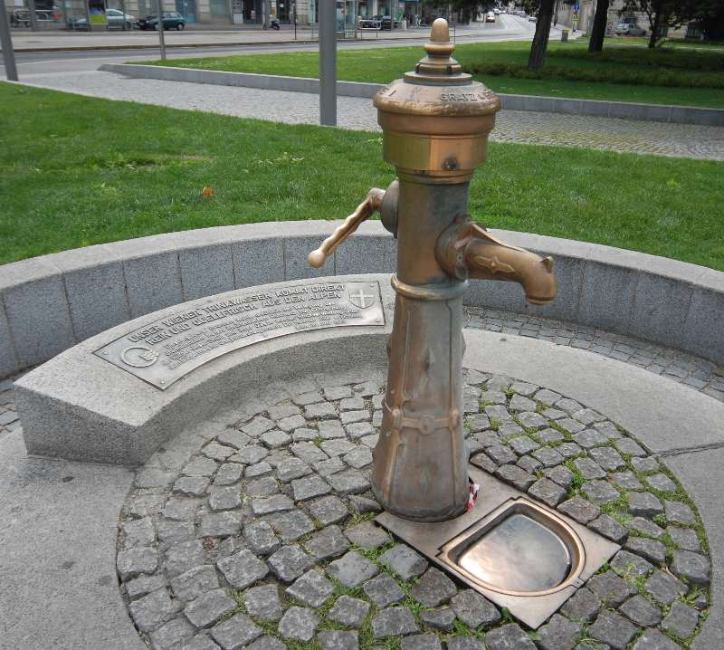 Ein Trinkbrunnen auf dem Schwarzenbergplatz in Wien, sogenannter goldener Brunnen